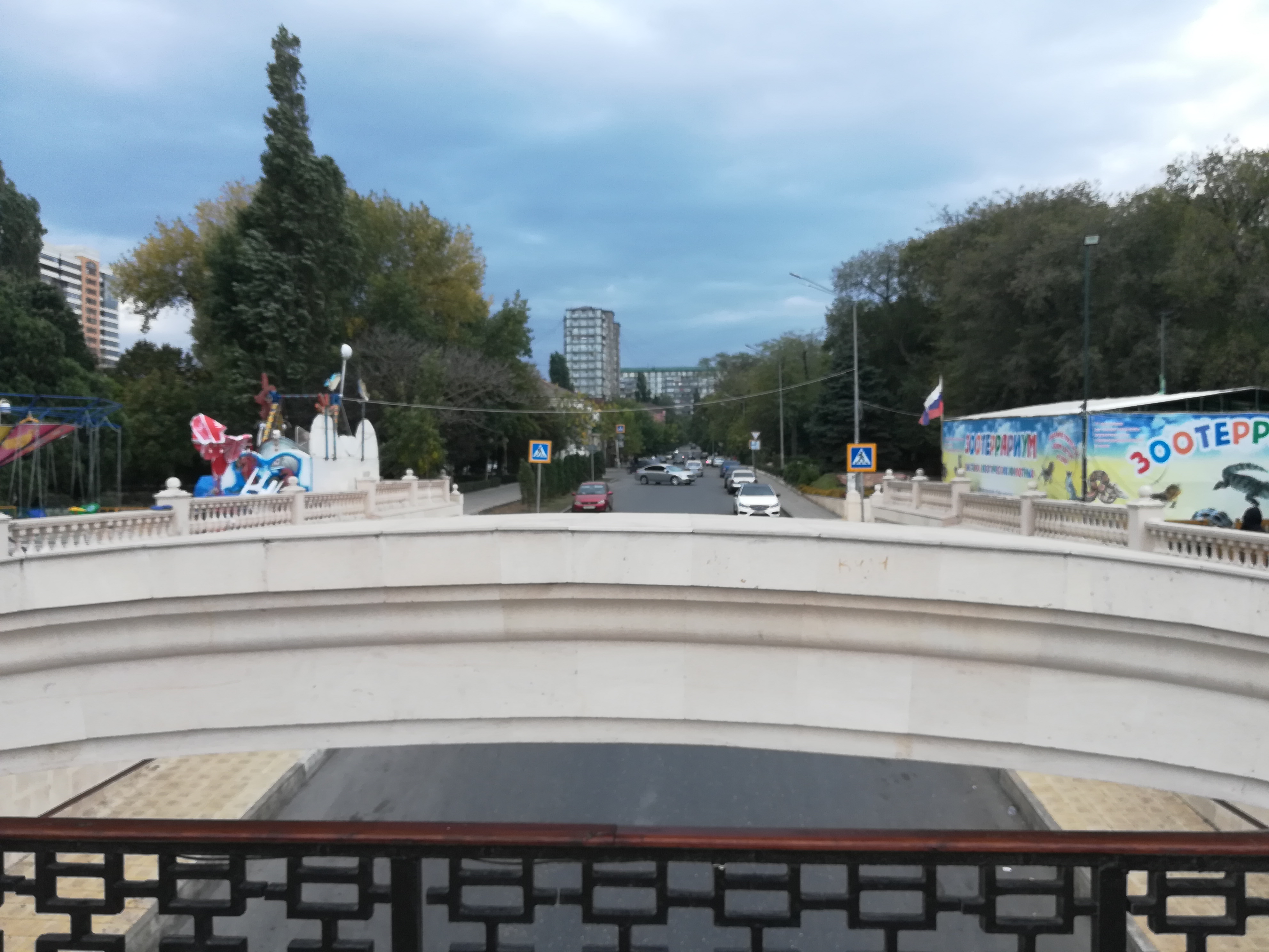 Махачкала